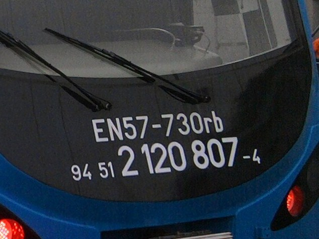 Stare i nowe oznaczenia na EN57